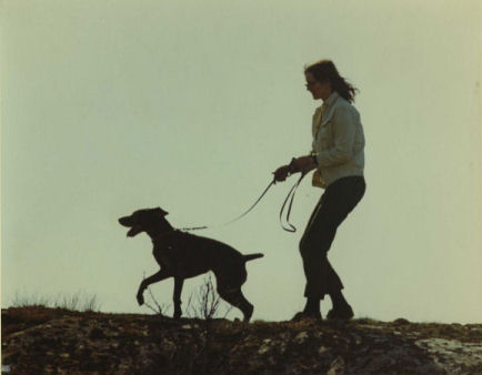 En av de stora entreprenörerna bakom svensk och internationell hundpsykologi, Ingrid Lingmark. Här på promenad med sin vorstehhund Kamilla 1966.